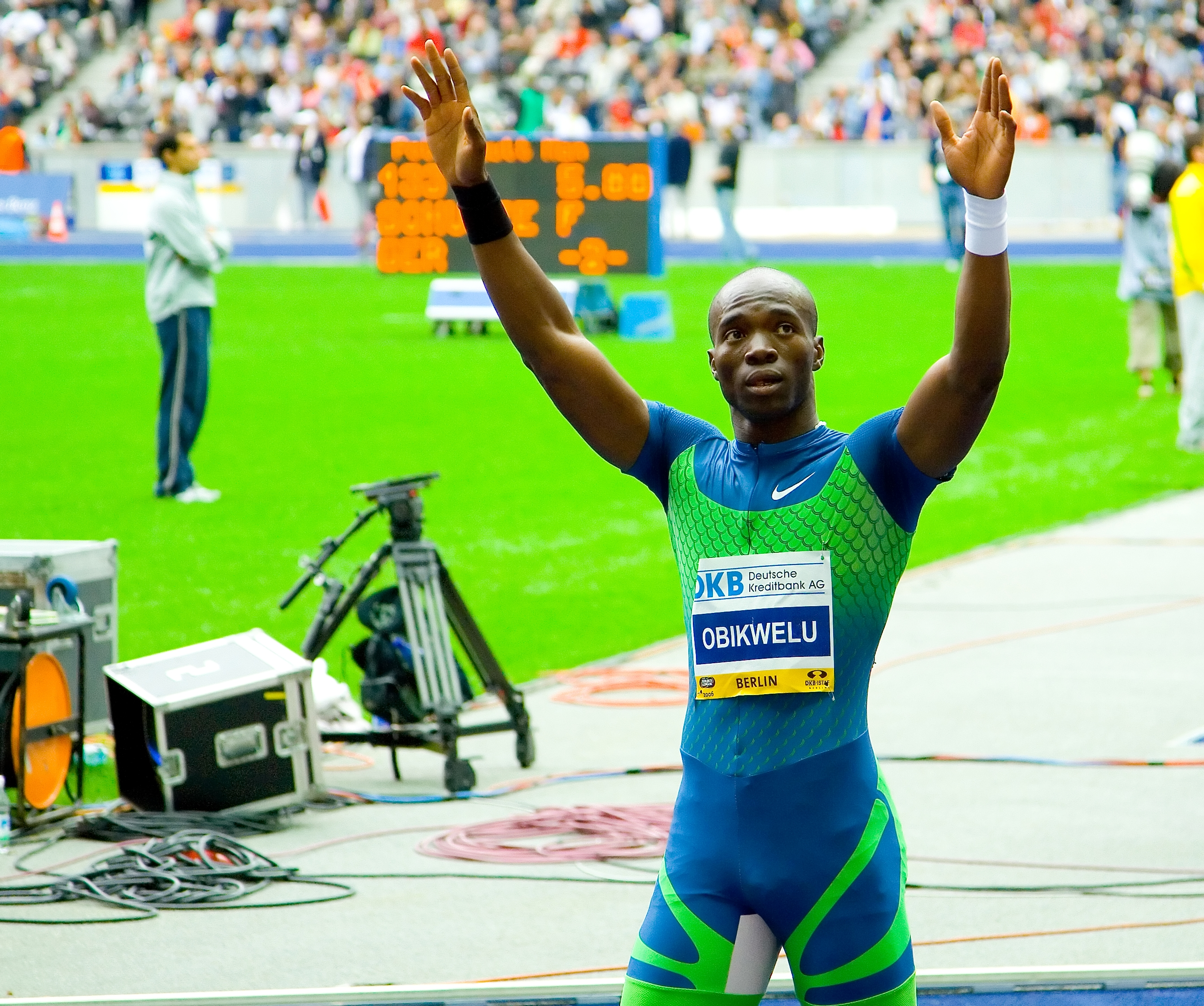 Francis Obikwelu 100m